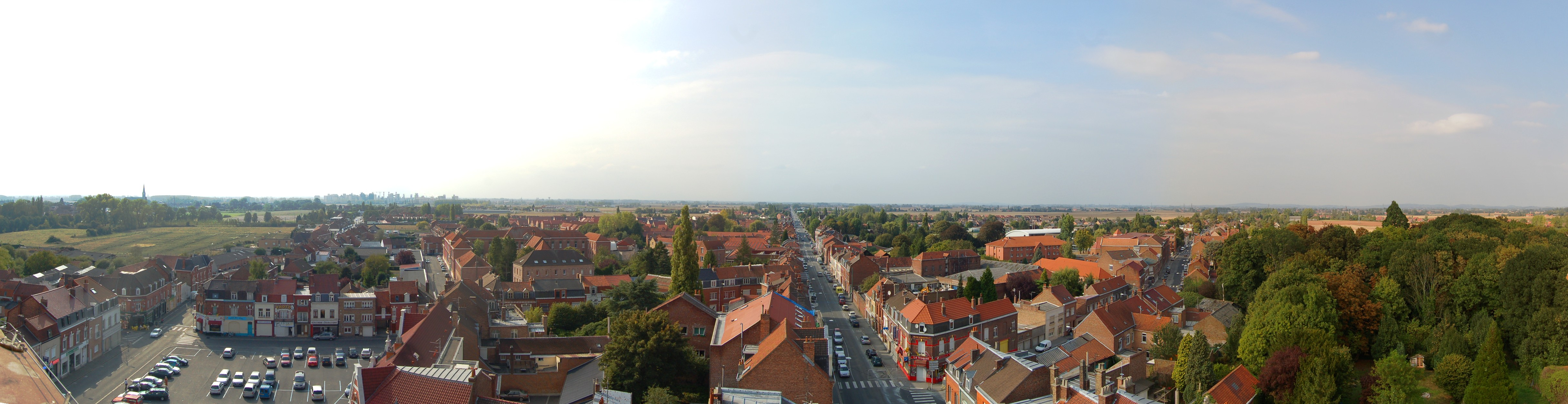 Panorama vue du Beffroi d'Estaires, Nord-Pas-de-Calais, France